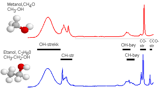 ATR spektra av rein metanol og etanol